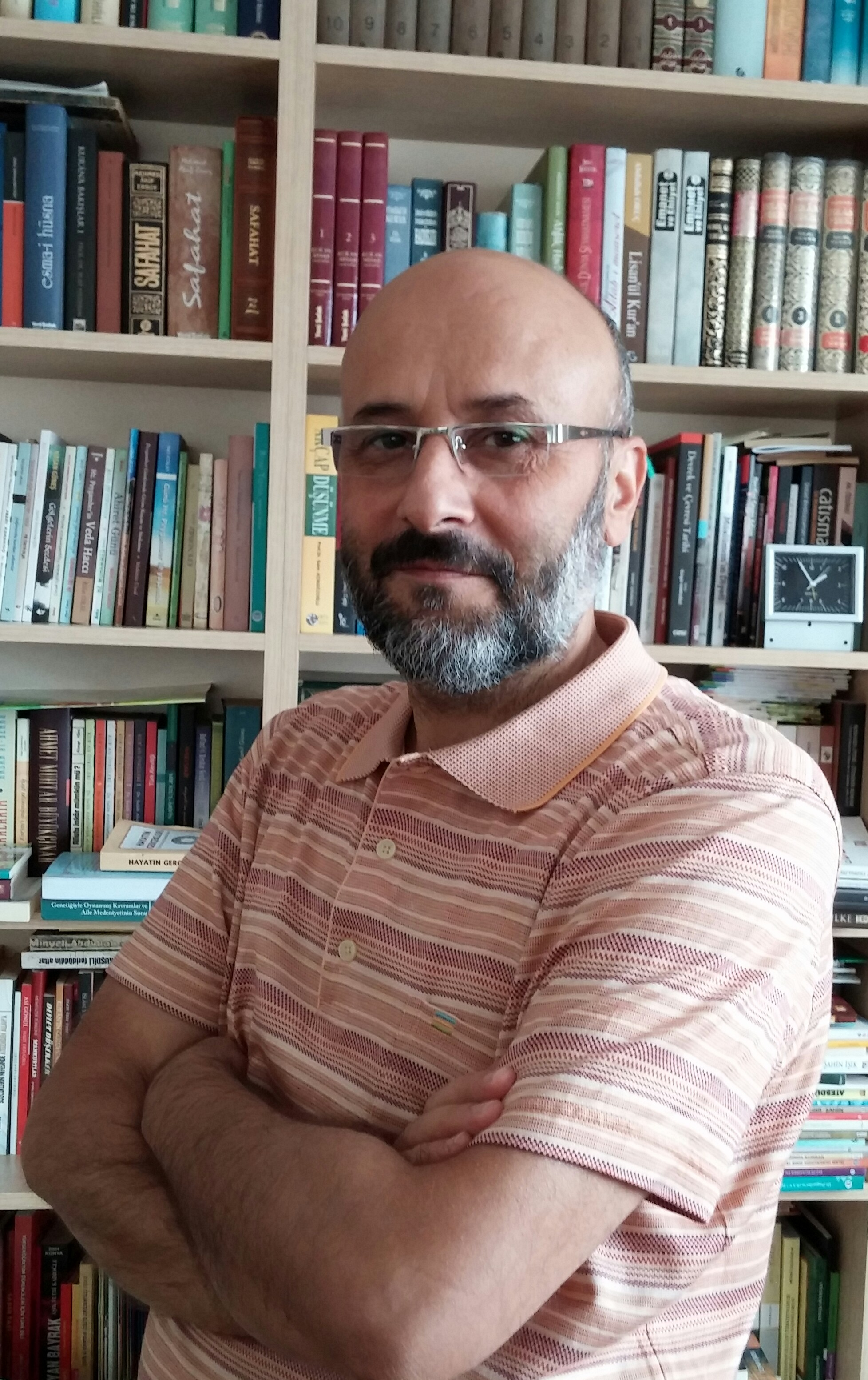 bir yazar kitaplığı